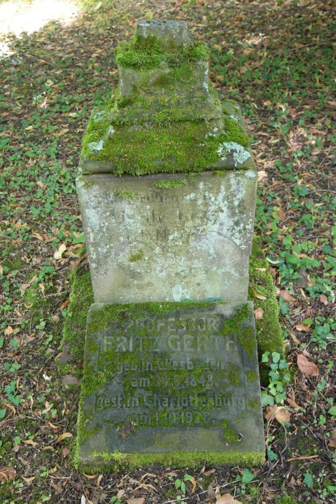 Grab des Bildhauers Fritz Gerth, 1848-1928, auf dem Alten Friedhof in Wiesbaden